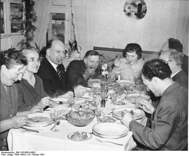 Eichwege, Walter und Lotte Ulbricht bei Bauern Zentralbild/Junge 24.2.1961 Walter Ulbricht bei den Werktätigen des Kreises Forst - herzlicher Empfang durch die Bevölkerung Der Vorsitzende des Staatsrates der DDR, Walter Ulbricht, traf am Vormittag des 24.2.61 von der Bevölkerung herzlich begrüsst im Niederlausitzer Grenzkreis Forst (Bez. Cottbus) ein. Gemeinsam mit Arbeitern, Genossenschaftsbauern und Vertretern der örtlichen Organe der Staatsmacht berät Walter Ulbricht in freimütigen Aussprachen den ersten Entwurf einer Ordnung für die Aufgaben und die Arbeitsweise der Kreistage und Gemeindevertretungen, die für die weitere Entwicklung der sozialistischen Demokratie von grosser Bedeutung ist. UBz: Walter Ulbricht und seine Gattin (3. und 2. von links) während des Mittagessens bei dem Genossenschaftsbauern Oskar Röhr in Eichwege Abgebildete Personen: Ulbricht, Walter: Staatsratsvorsitzender, Erster Sekretär des Zentralkomitees (ZK) der SED, Vorsitzender des Nationalen Verteidigungsrates, DDR Ulbricht, Lotte: Frauenkommission beim Politbüro der SED, wissenschaftliche Mitarbeiterin im Institut für Marxismus-Leninismus beim Zentralkomitee (ZK) der SED, DDR (GND 124576559)